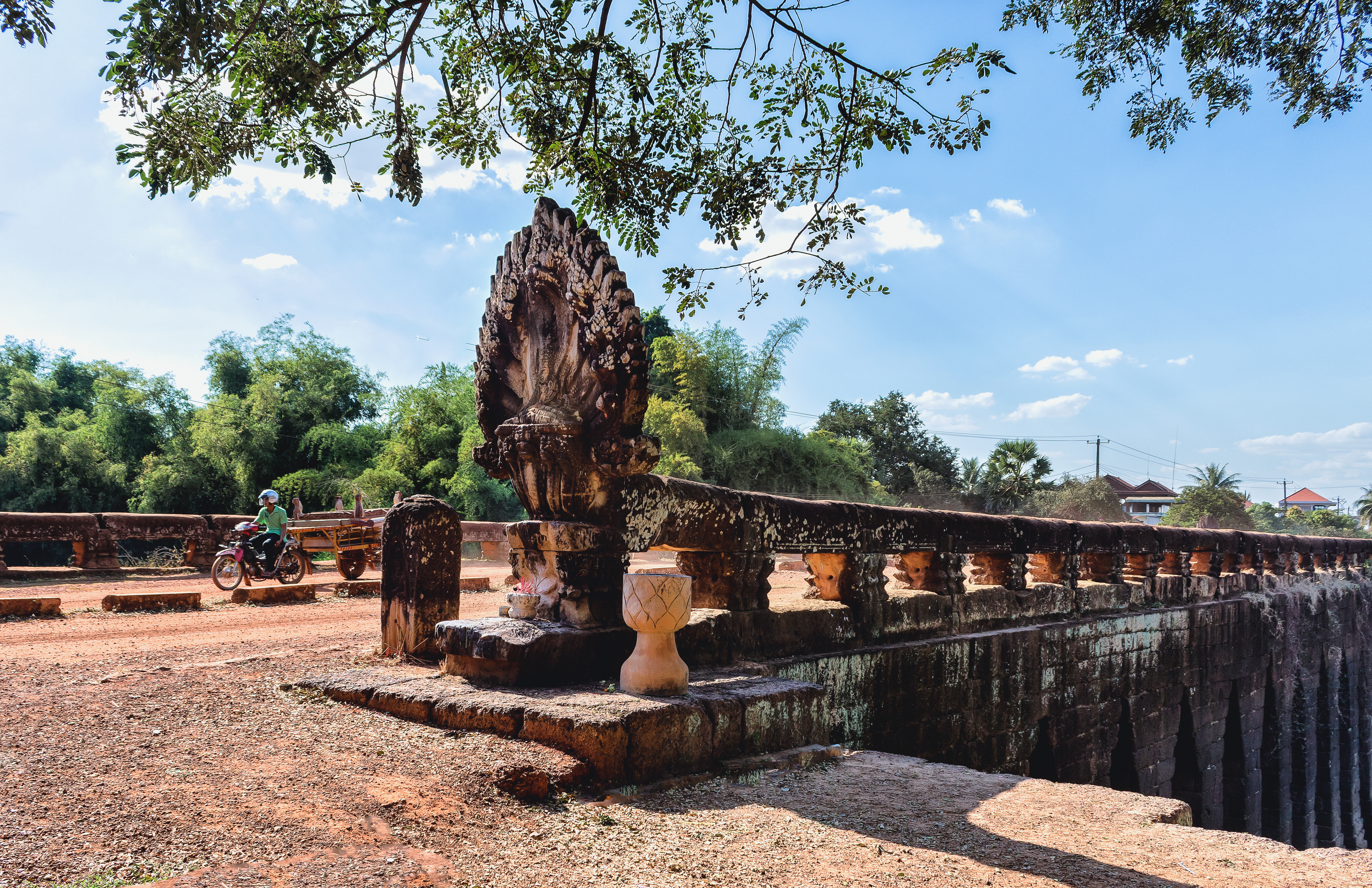 Cầu cổ Kampong Kdei ở Campuchia.